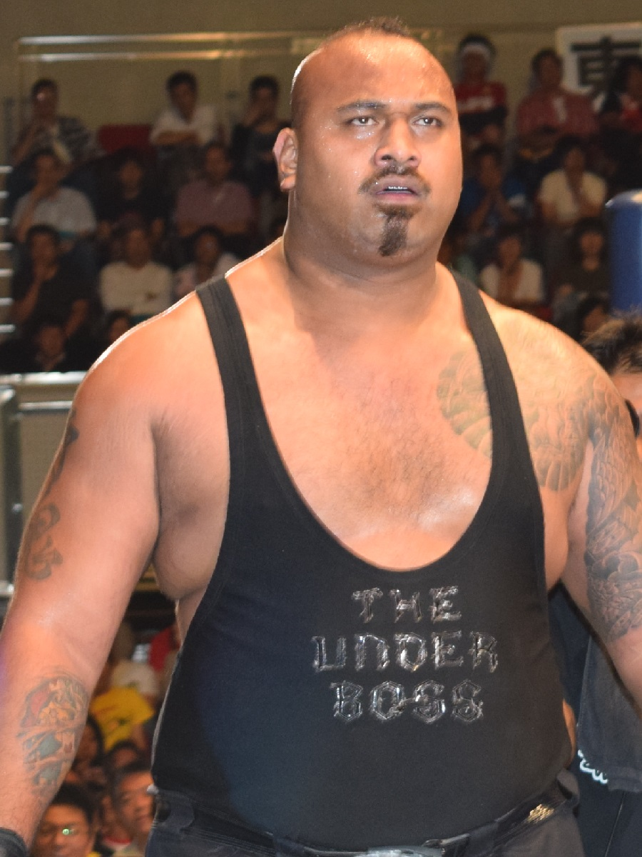 2015年9月27日 ワールド記念ホール「DESTRUCTION in KOBE」 バッドラック・ファレ